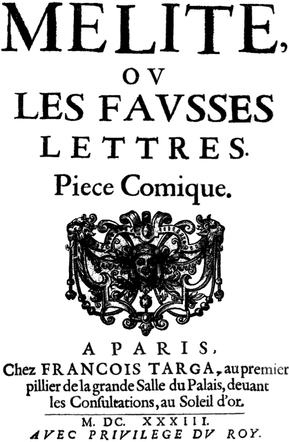 Title page from "Mélite, ou les fausses Lettres" (1633 edition), by Pierre Corneille (1606-1684)